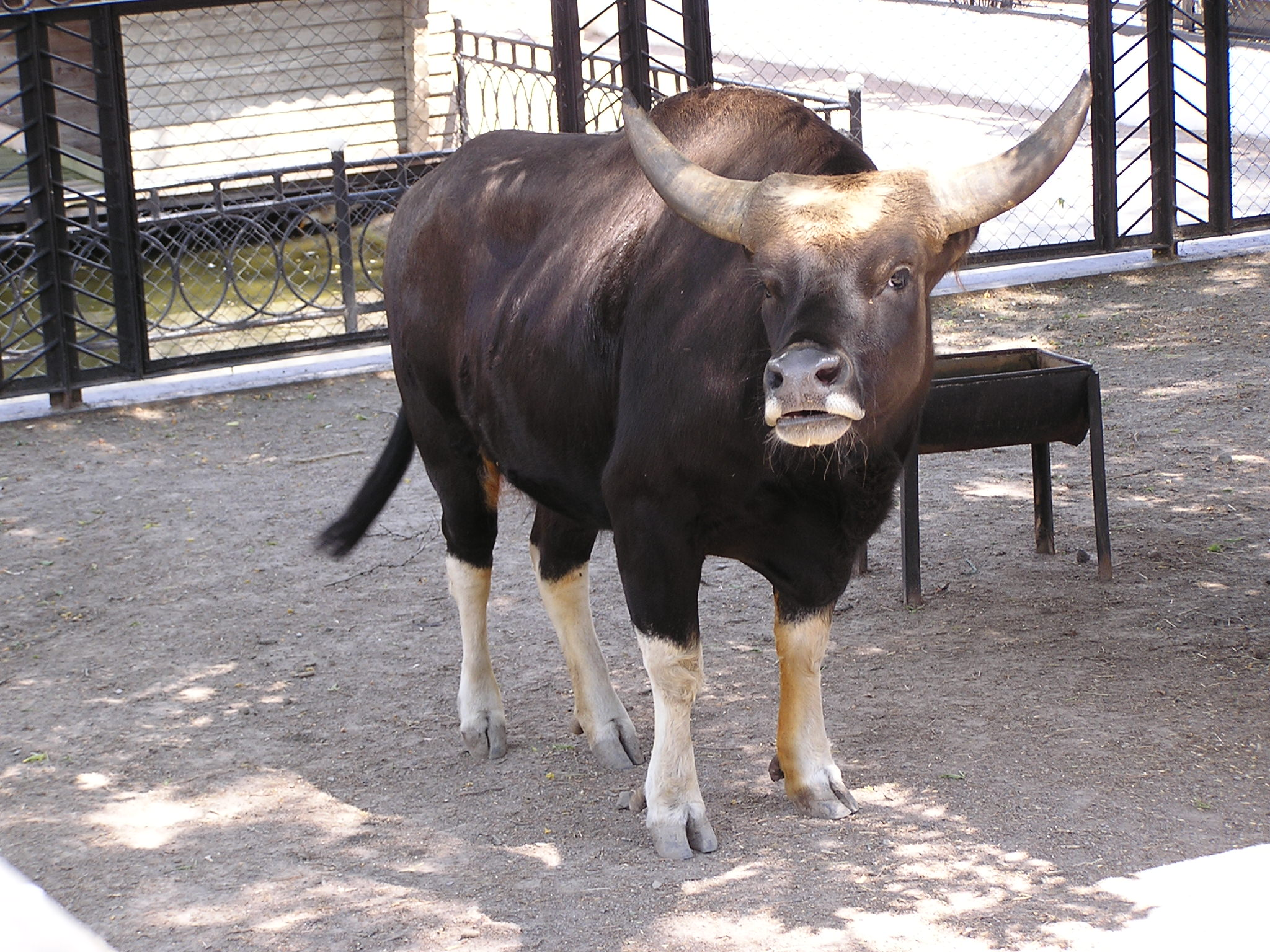 Зоопарк в Докучаевске This pfotography taken in Dokuchaevsk ZOO Note: ZOO co-ordinates is